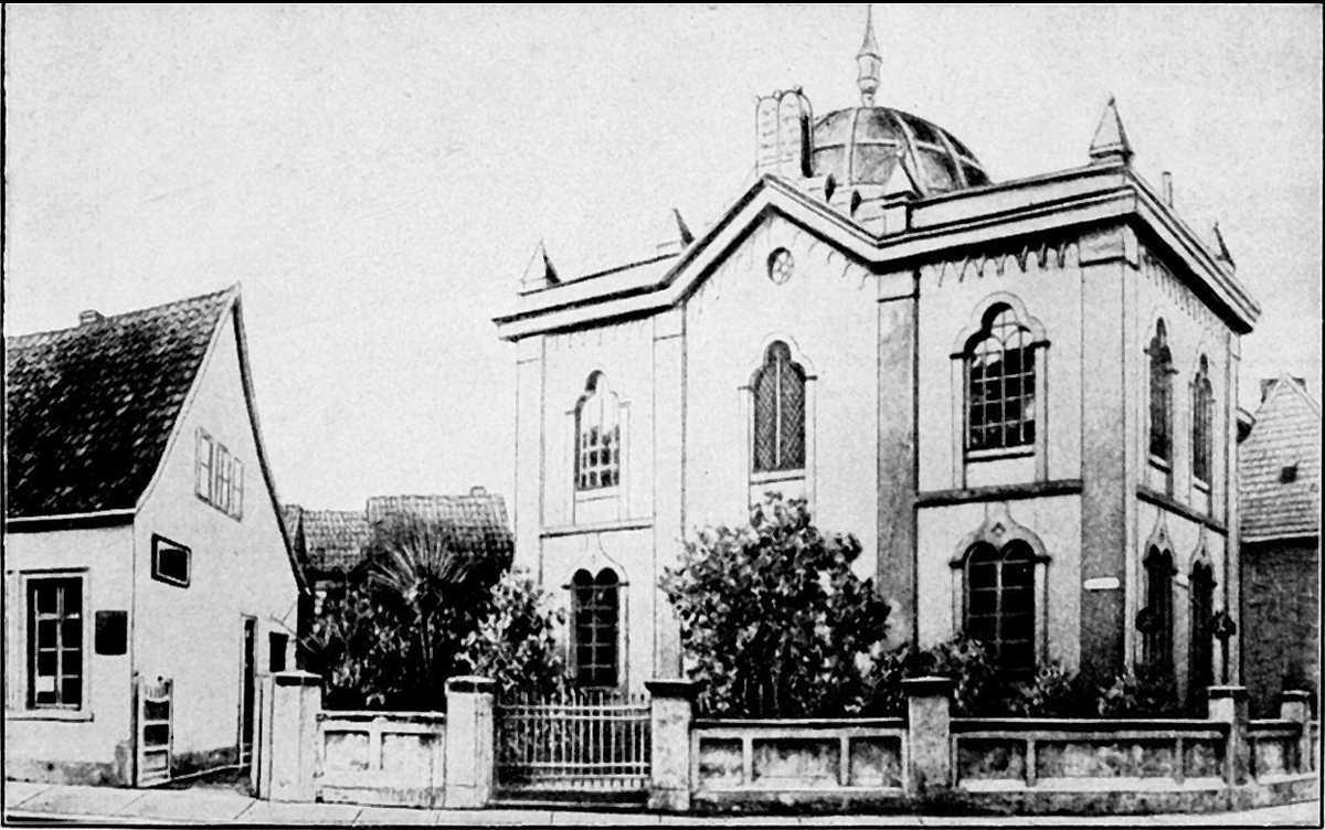 Die erste jüdische Synagoge in Bielefeld auf dem Grundstück des Wendt'schen Hof (heute Klosterplatz). Erbaut im Jahre 1847